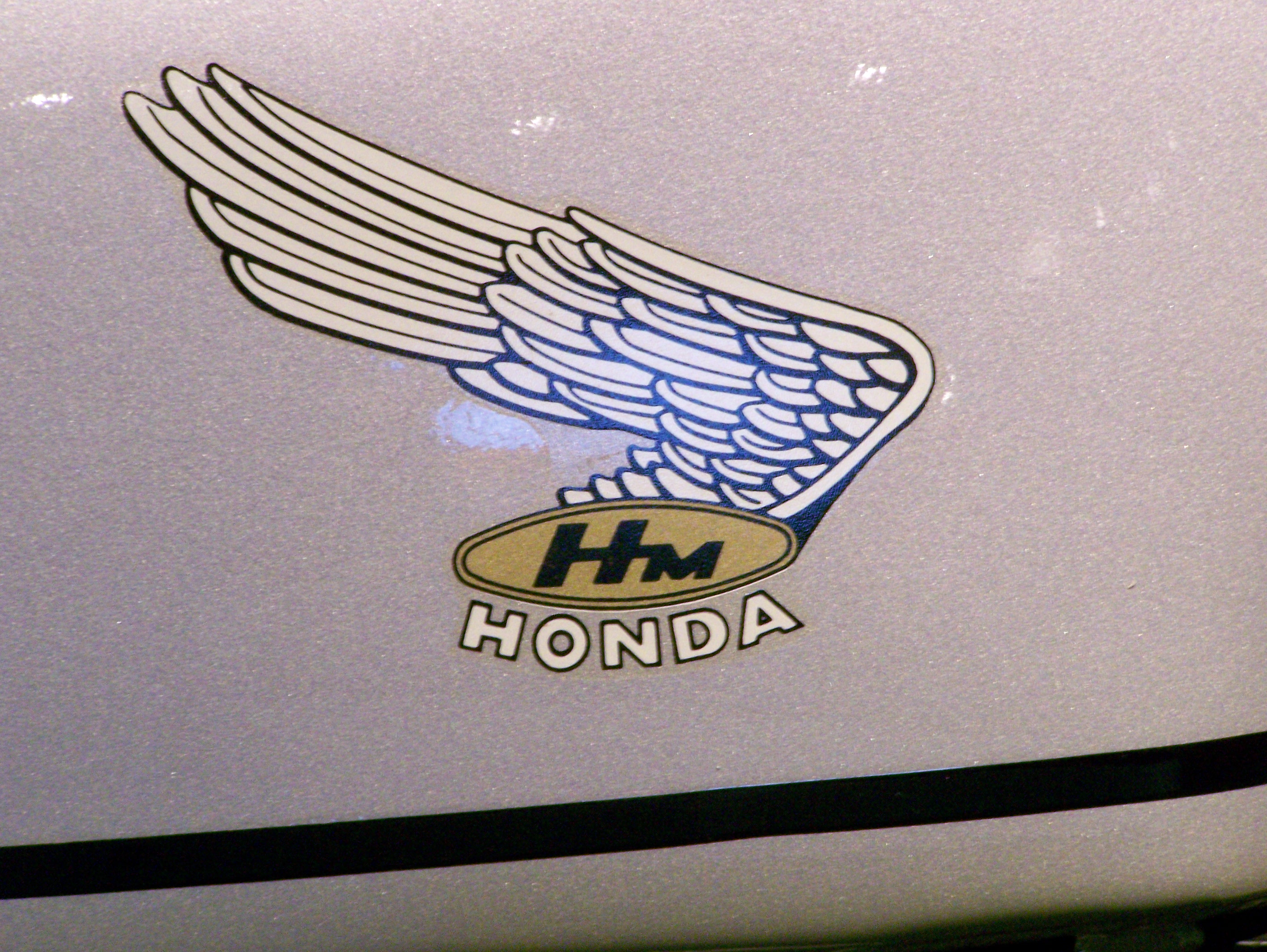 Barber Vintage Museum_366 1962 Honda CR110 Honda logo